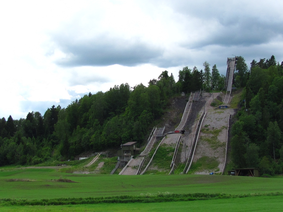 Breimyrbakkene: K10, K5, K20, K40 og K61 med dommertårn. Breimyrbakkene befinder sig i Botne i Holmestrand kommune, Vestfold fylke, Norge